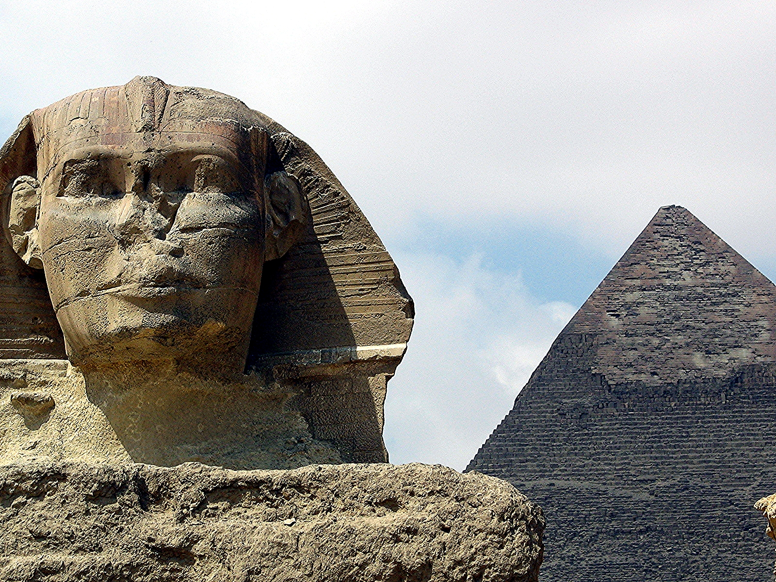 Sphinx und Pyramide Gizeh